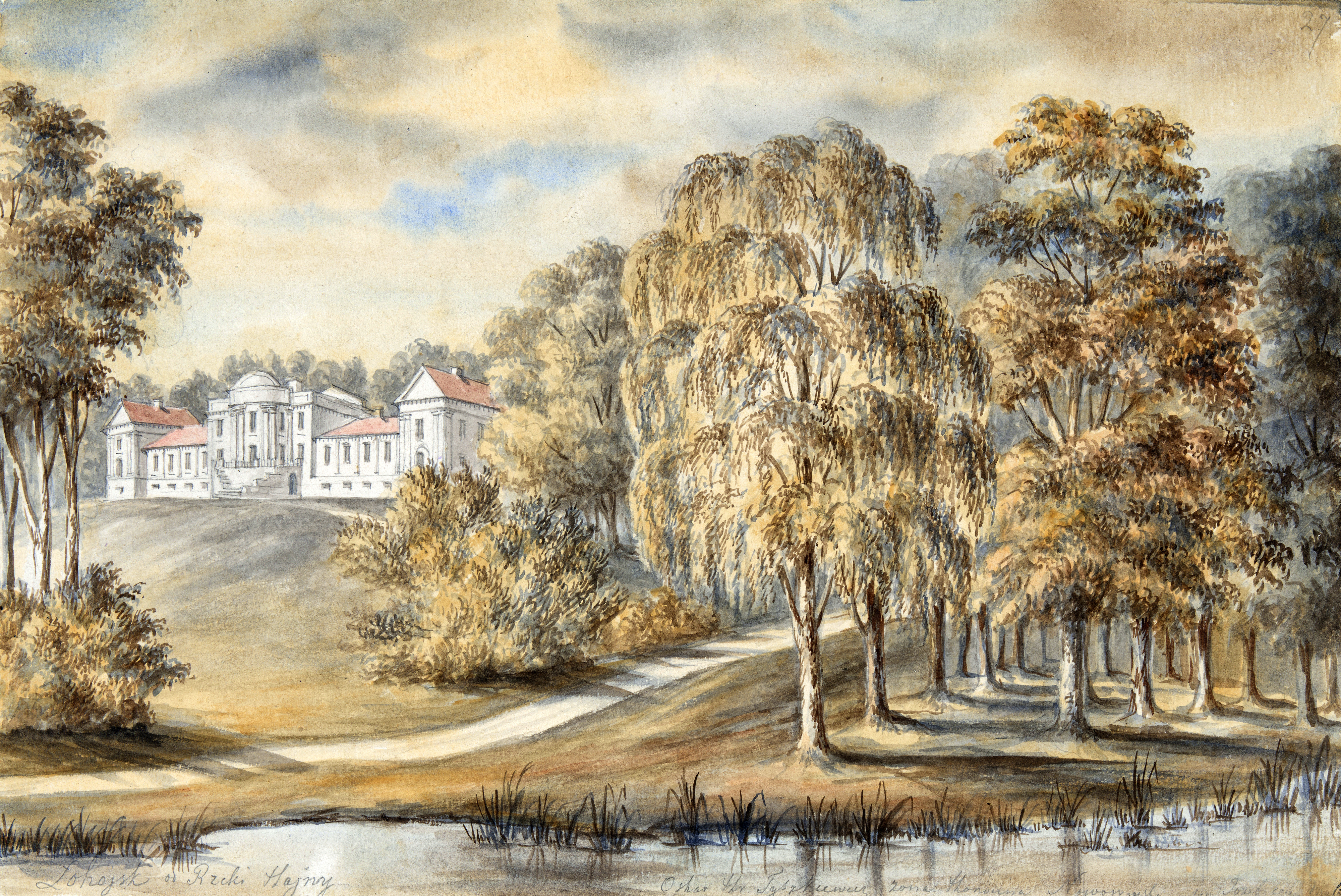 Беларуская (тарашкевіца): Лагойск (Łahojsk), палац Тышкевічаў (Tyškievič)